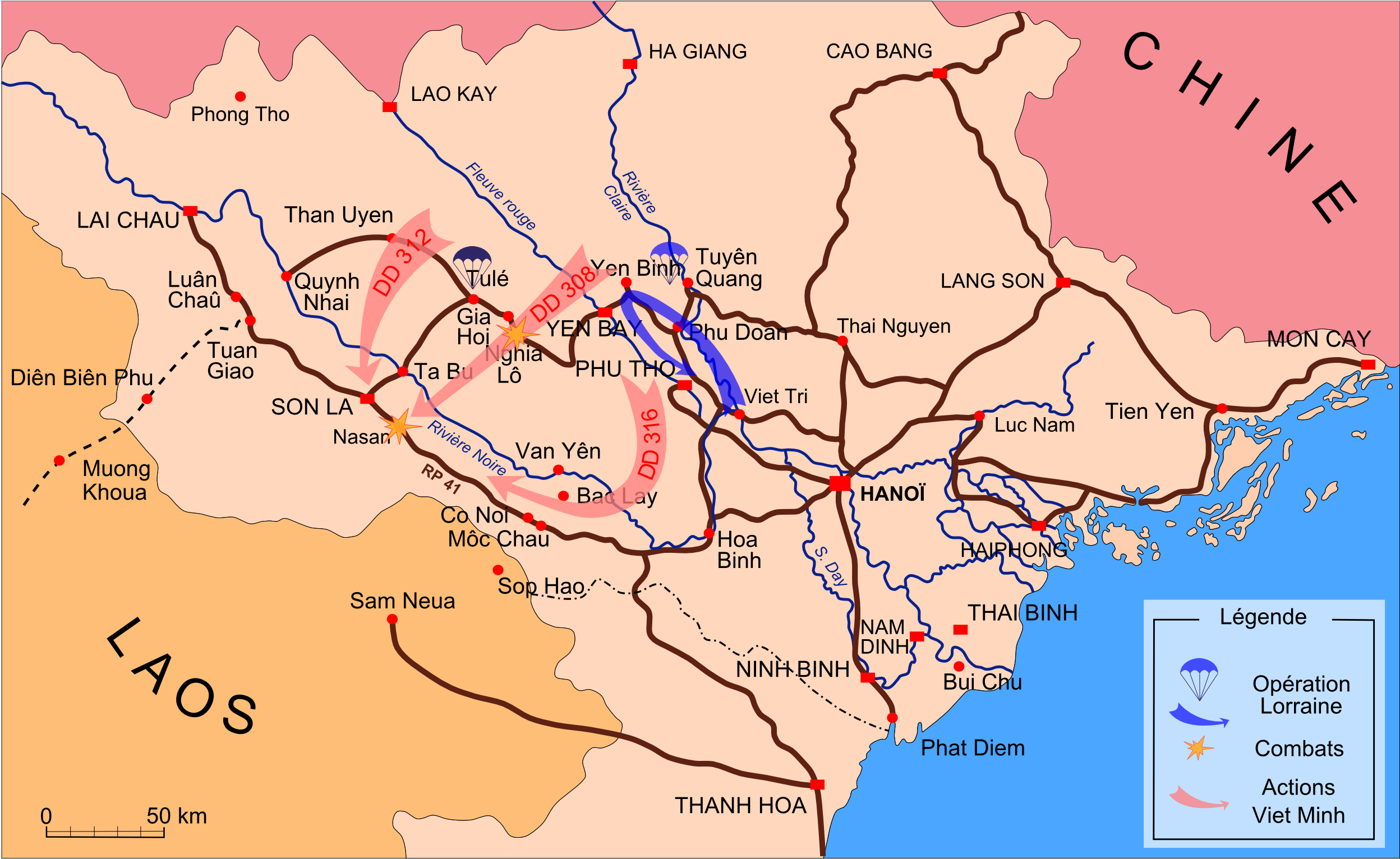 Vue générale de la bataille de Na San et de l'opération Lorraine en automne 1952. Suivant plan page 339 de 'Mémoires - Fin d'un empire du général Salan et plan page 96 de Indochine 52-53 de Erwan Bergot.